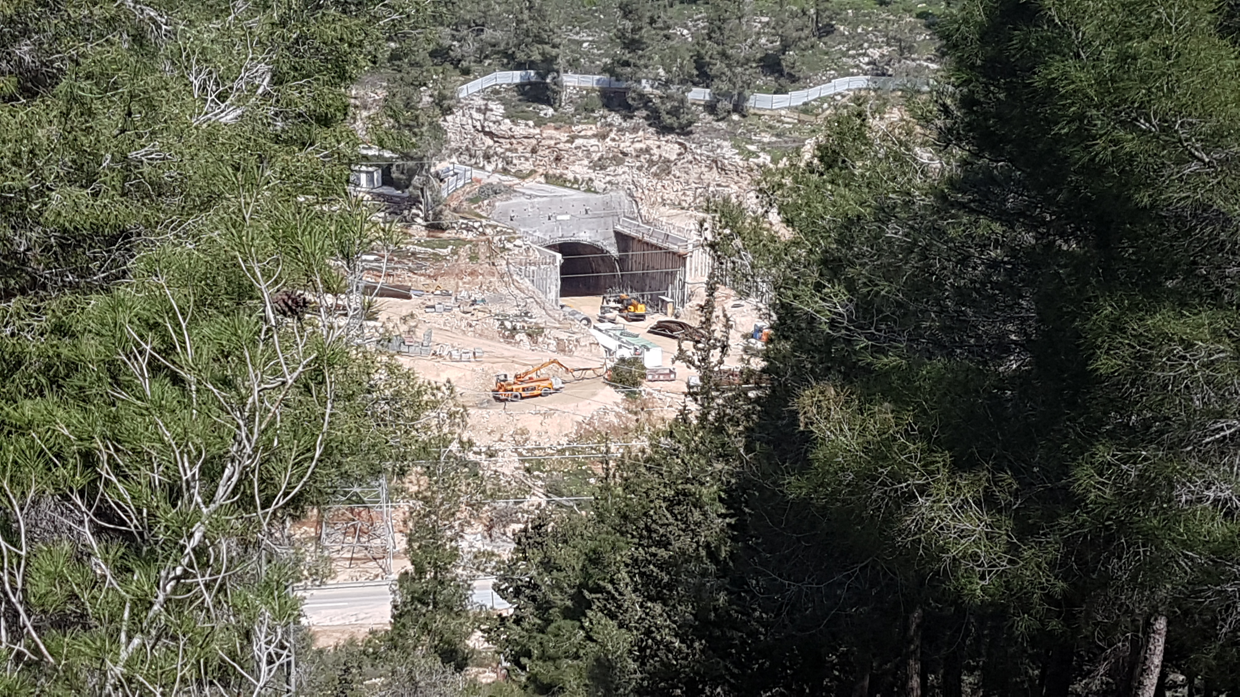 עבודת הקמת מנהרת הר נוף בכביש 16 בישראל, ירושלים, מרץ 2020